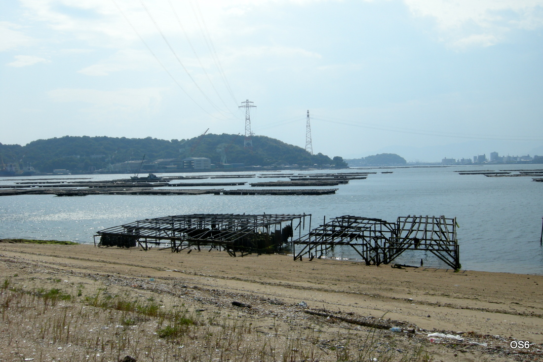 広島県坂町鯛尾付近